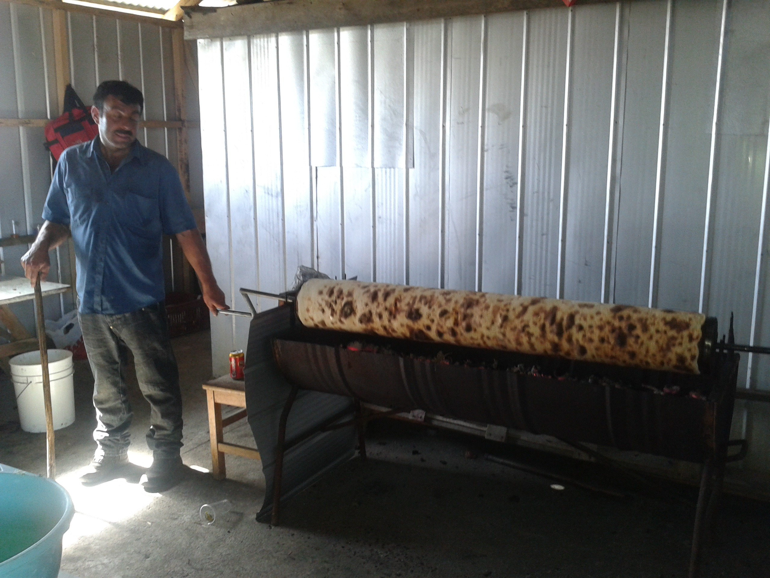 Tomé esta fotografía en una fiesta costumbrista en Pid Pid, Castro, Chiloé. Así se hace la chochoca tradicionalmente, es una masa en base a papa cruda, cocida y harina, que se cuece con chicharrones pegados al palo, lo que hace que la masa no se pegue a este. después se hace un corte horizontal, se enrolla sobre si misma, y se cortan rodajas al momento de servir.